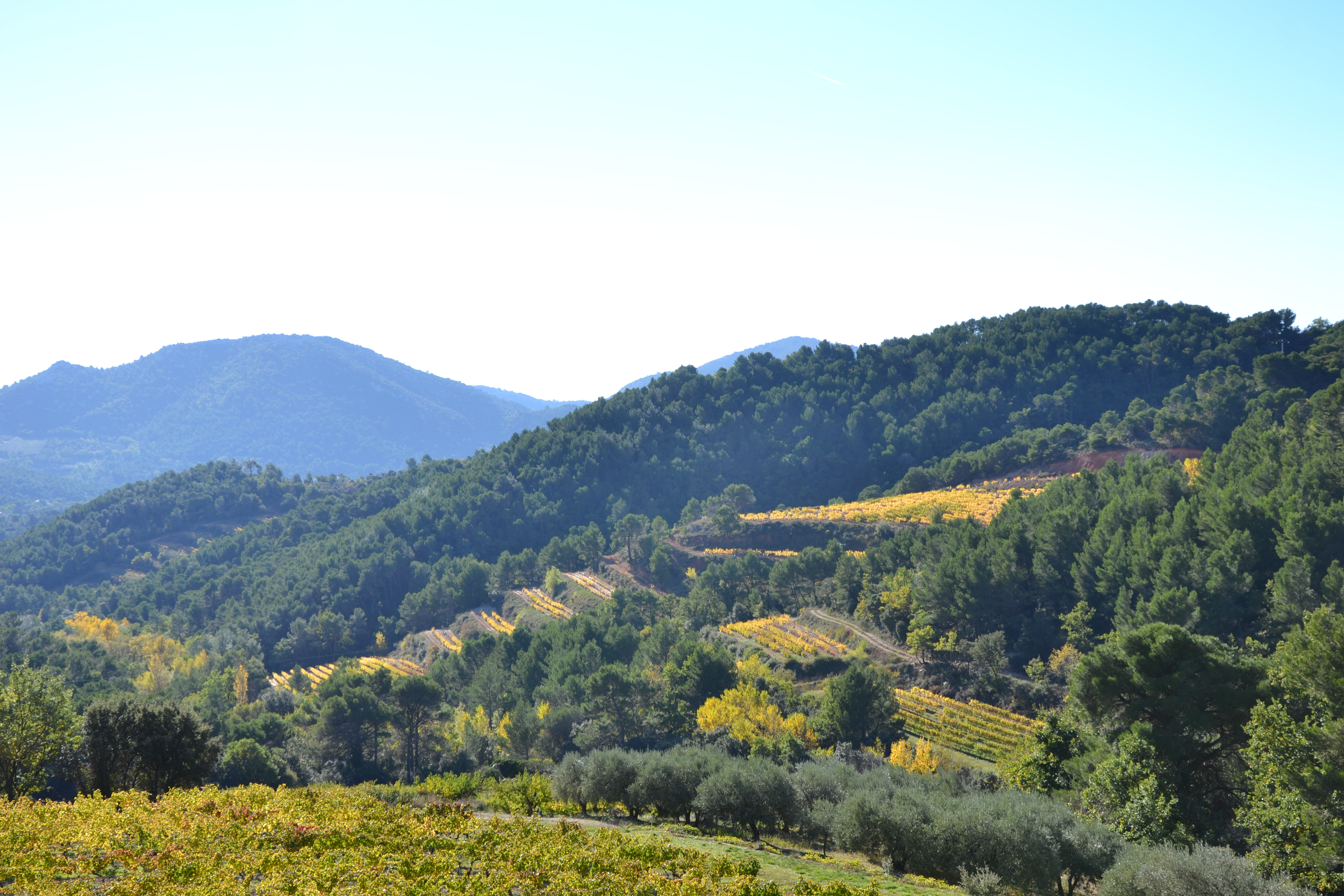 Restanques près de Suzette